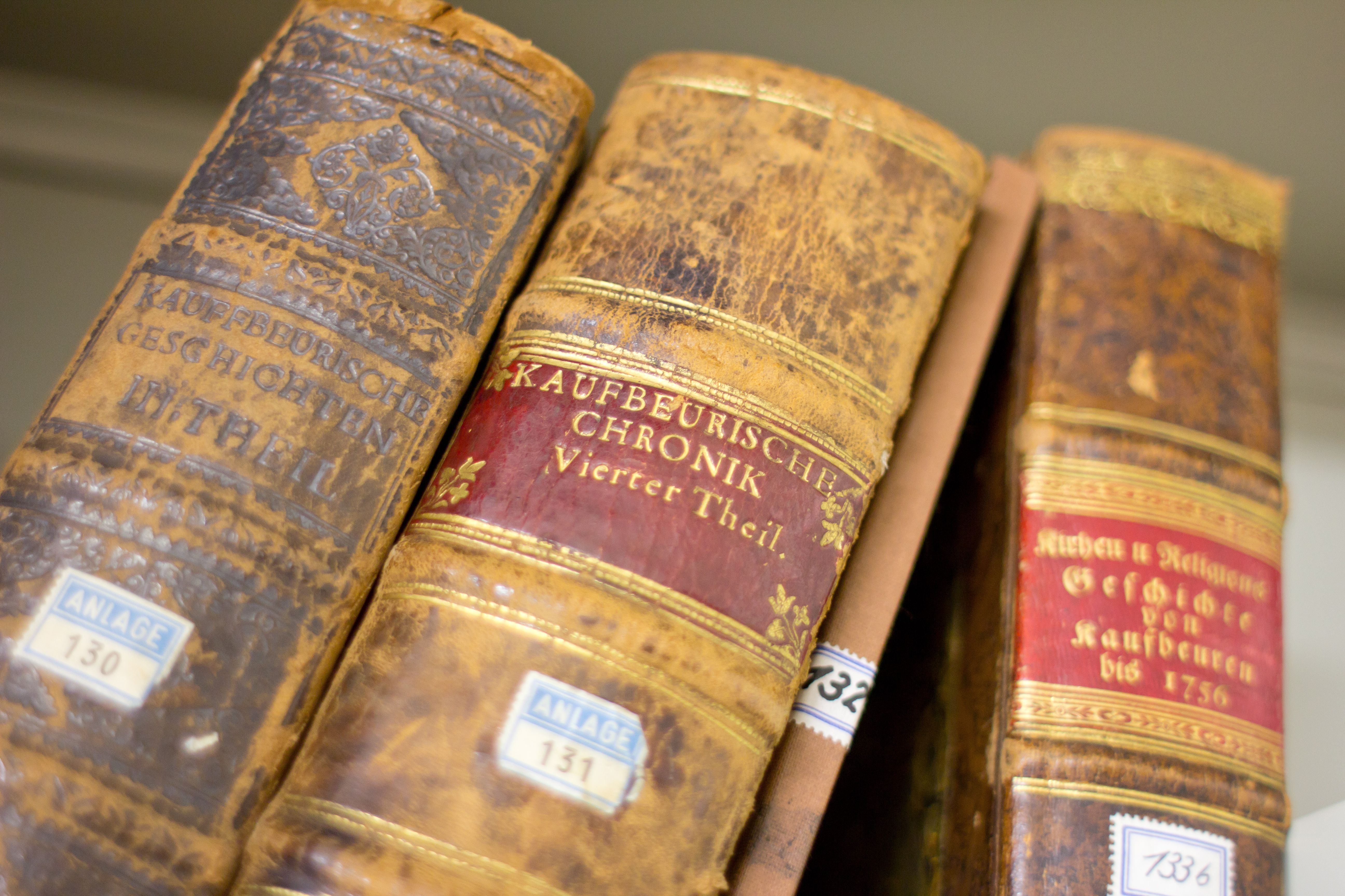 Kaufbeurische Chronik im Evangelischen Kirchenarchiv, Detail, anlässlich Glamwiki-Treffen, Führung im Archiv